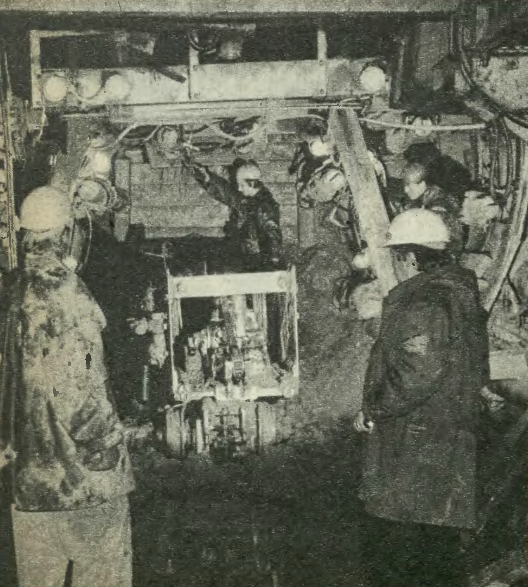 Budowa tunelu szlakowego metra B11 Pole Mokotowskie-Politechnika, czerwiec 1985.